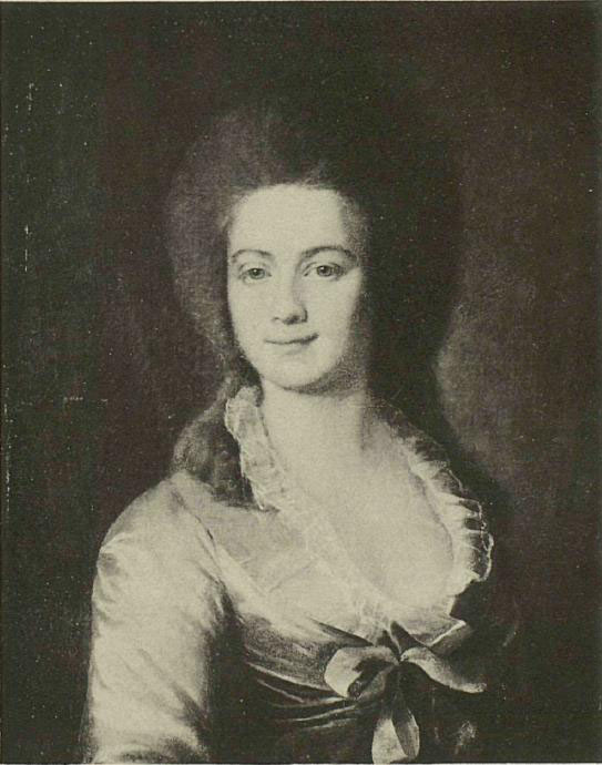 Прасковья Ивановна Гурьева (1757-1813), близкая особа А.В.Храповицкого